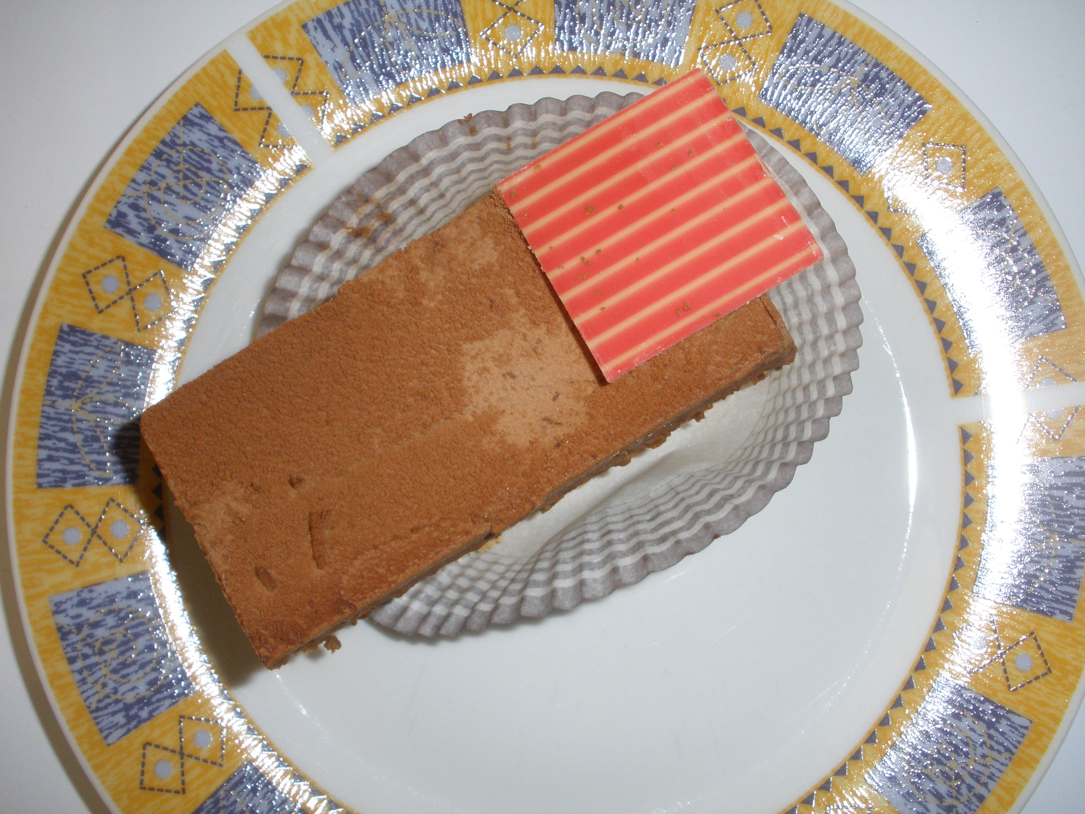 Gâteau.